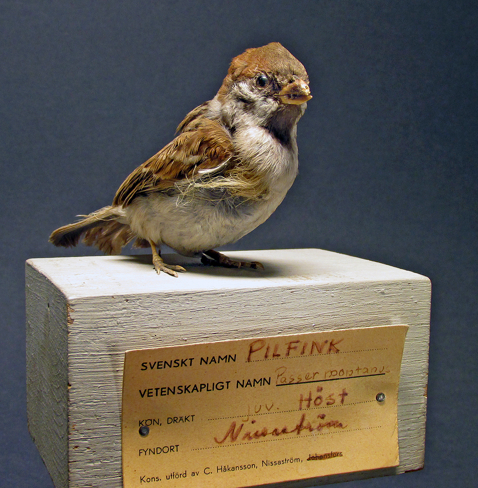 Uppstoppad Pilfink. Konserveringen gjord tidigt 70-tal. Vingbruten och sliten efter många års hantering i skolmiljö.